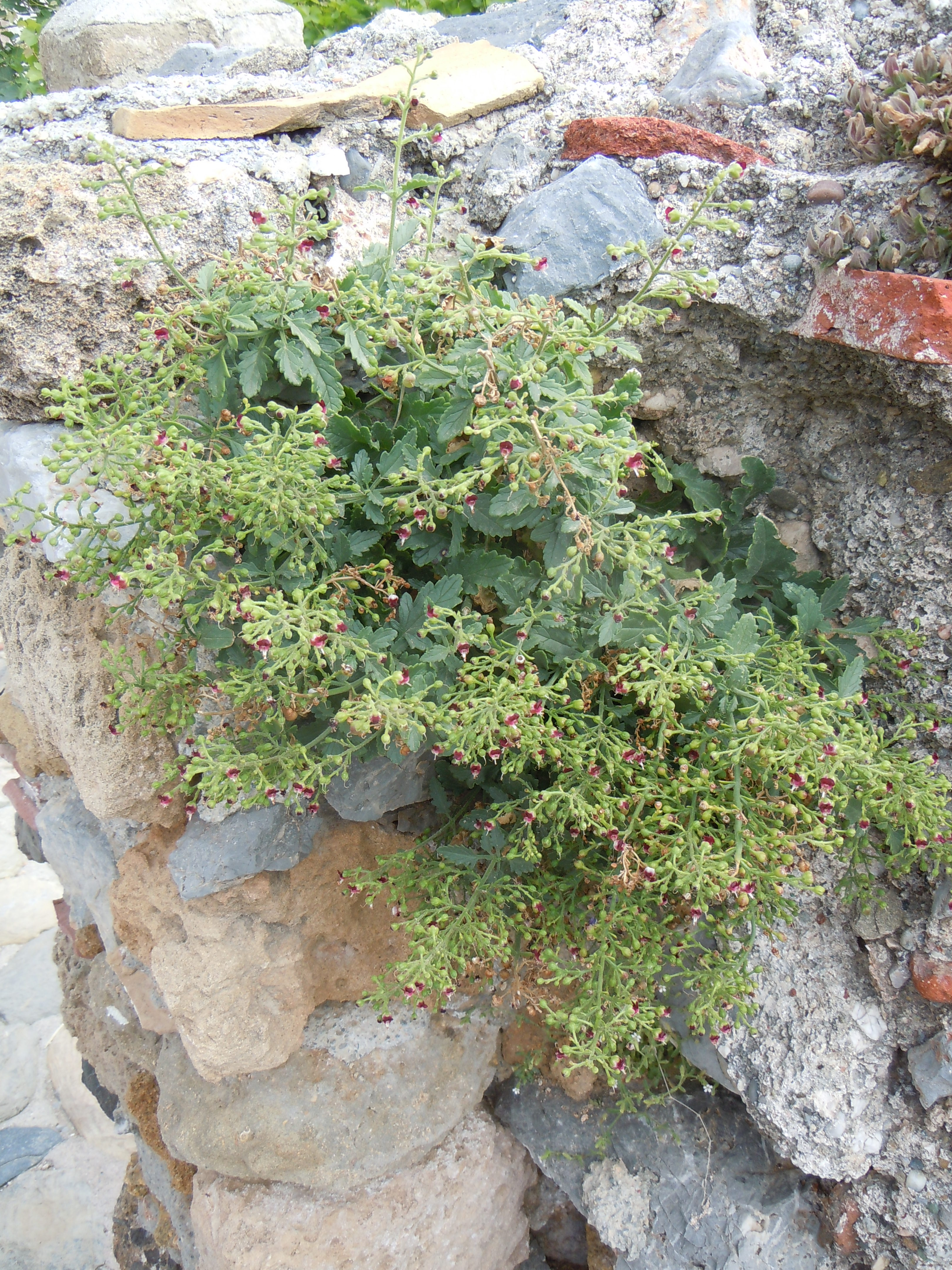 Scrophularia heterophylla sur un mur à Monemvasia Détail